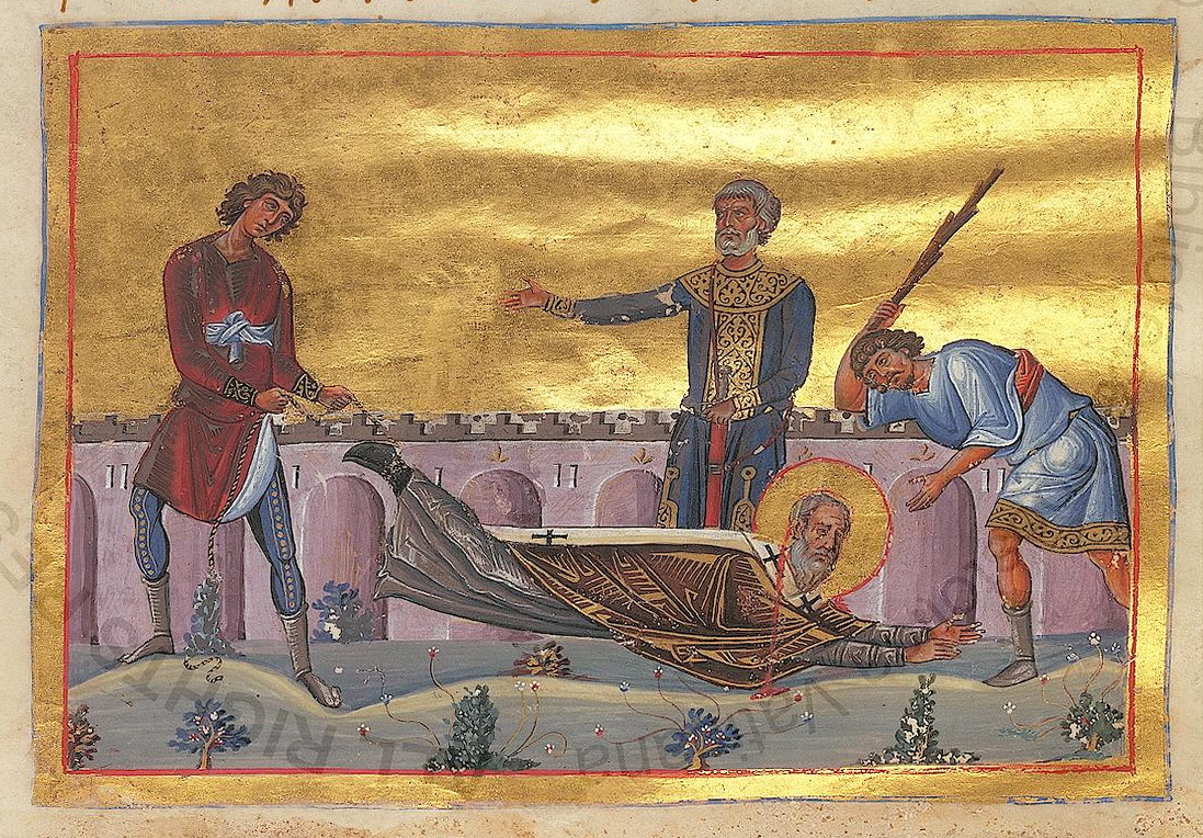 Священномученик Дорофей Тирский Константинополь. 985 г. Миниатюра Минология Василия II. Ватиканская библиотека. Рим.